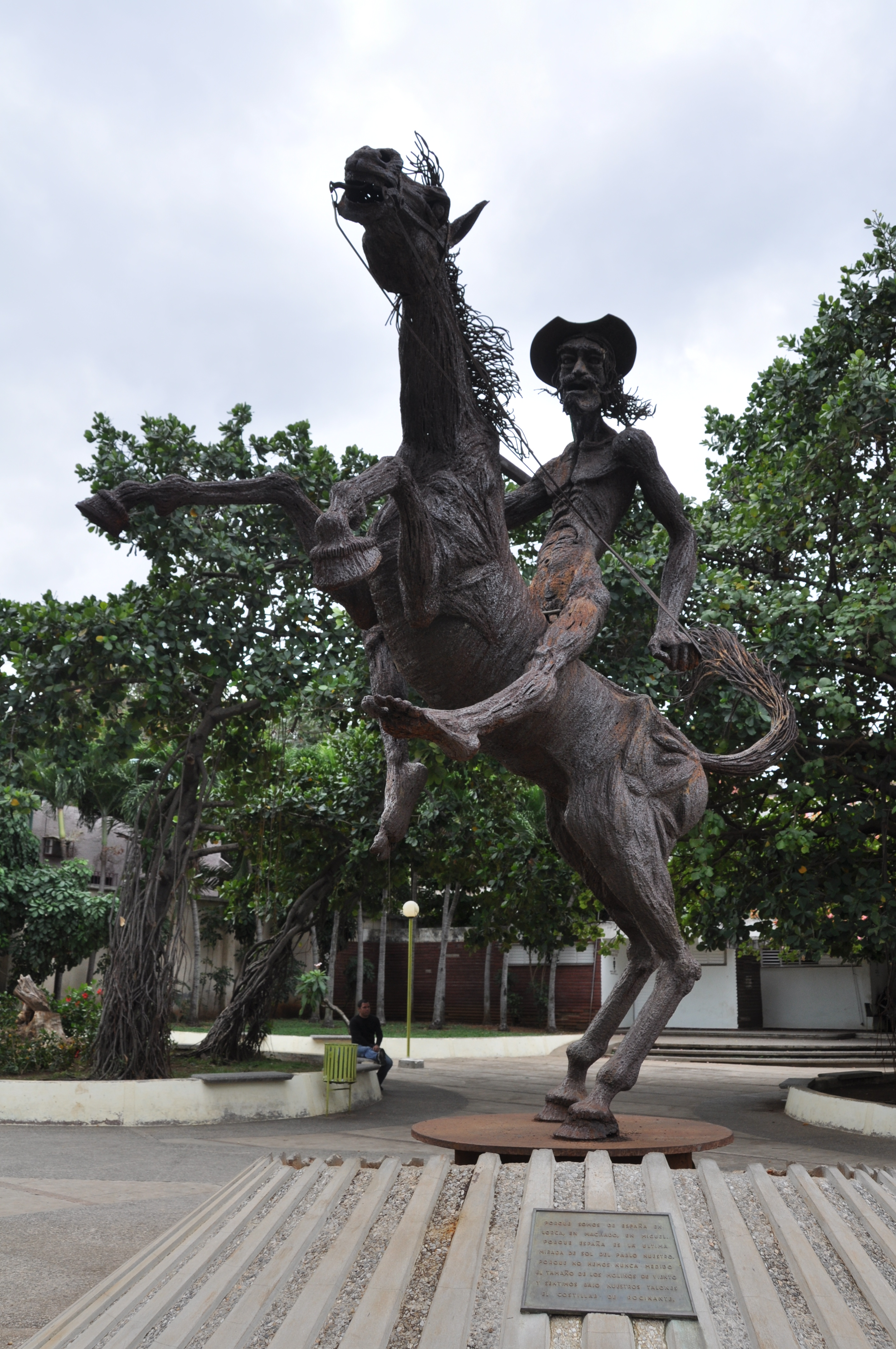 Un Don Quichotte dévêtu (ou universel et intemporel) à Vedado, au Parque del Quijote de las Americas sur Calle 23, la Havane, sculpture de Sergio Martínez. Il est écrit: "Porque somos de España en Lorca, en Machado, en Miguel. Porque España es la ultima mirada de sol del Pablo nuestro. Porque no hemos nunca medido el tamaño de los molinos de viento y sentimos bajo nuestros talones el costillar de Rosinante." Ce qui signifie "Parce que nous sommes d'Espagne de Lorca, de Machado, de Miguel. Parce que l'Espagne est le dernier regard de soleil de notre Pablo. Parce que nous n'avons jamais mesuré la taille des moulins à vent et senti sous nos talons les côtes de Rossinante." Photo personelle